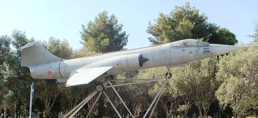 F104 esposto alla Facoltà di Ingegneria dell'Università di Palermo